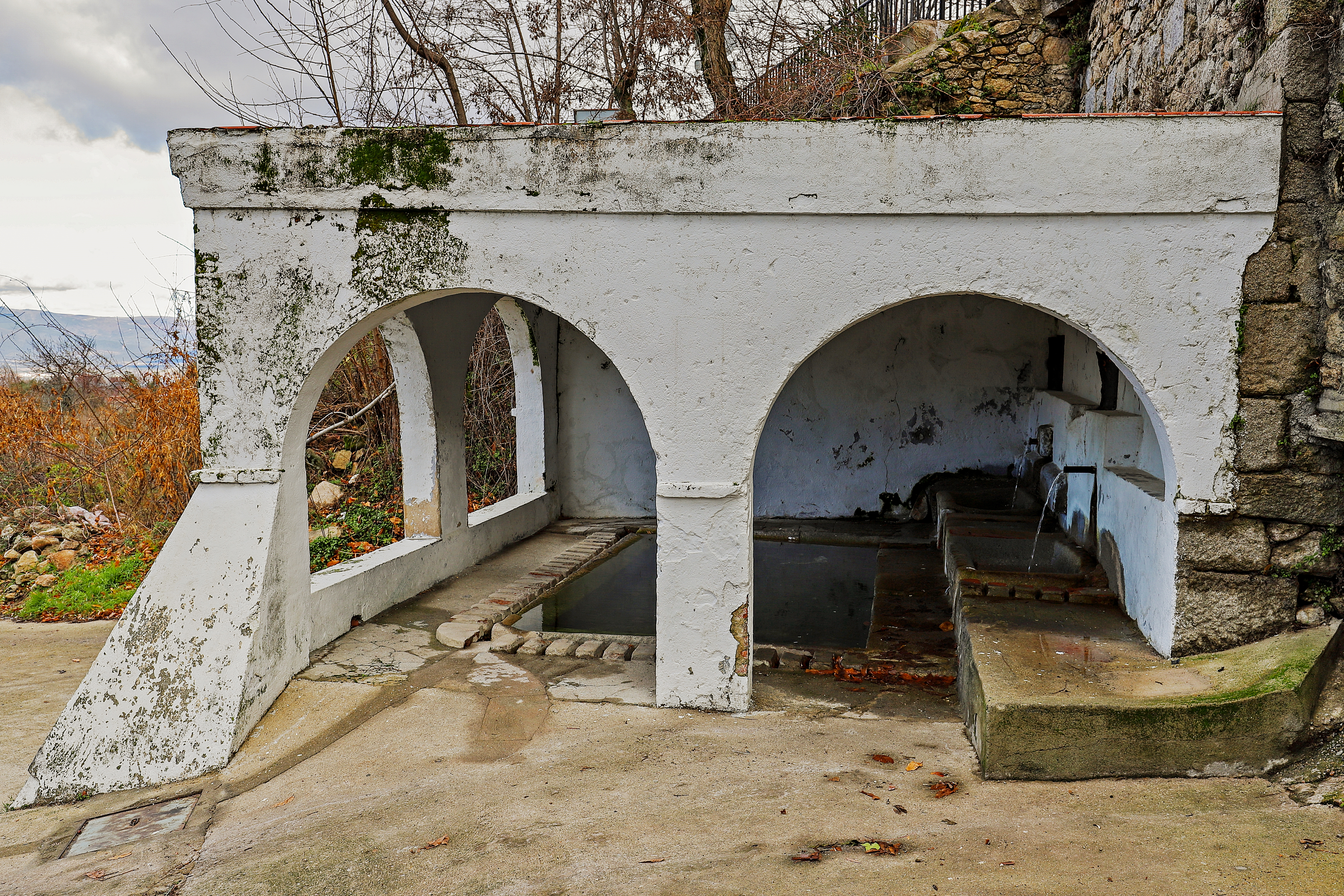 Cabezabellosa es un municipio de la comarca de Trasierra en la provincia de Cáceres.